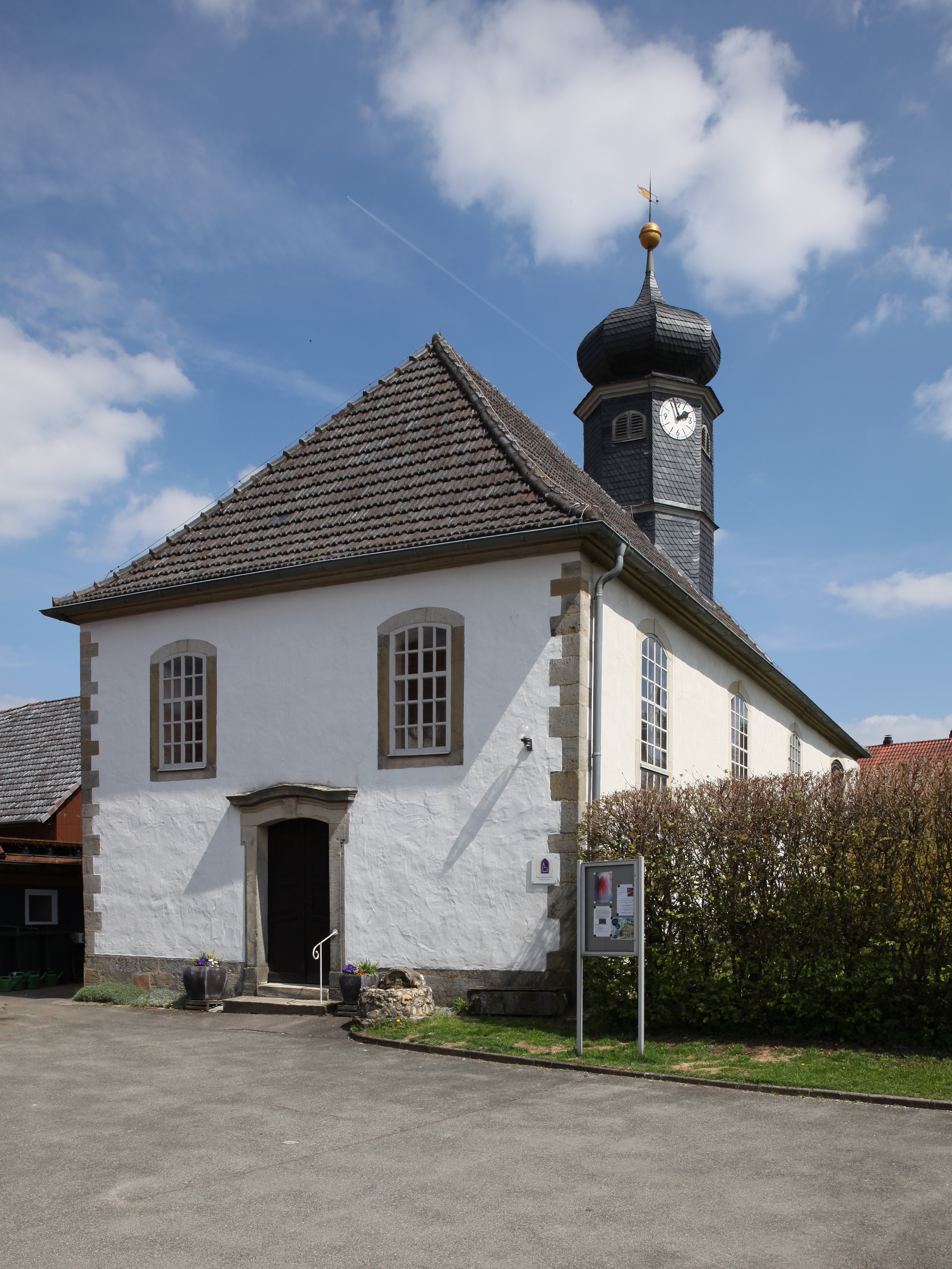 St. Paulus